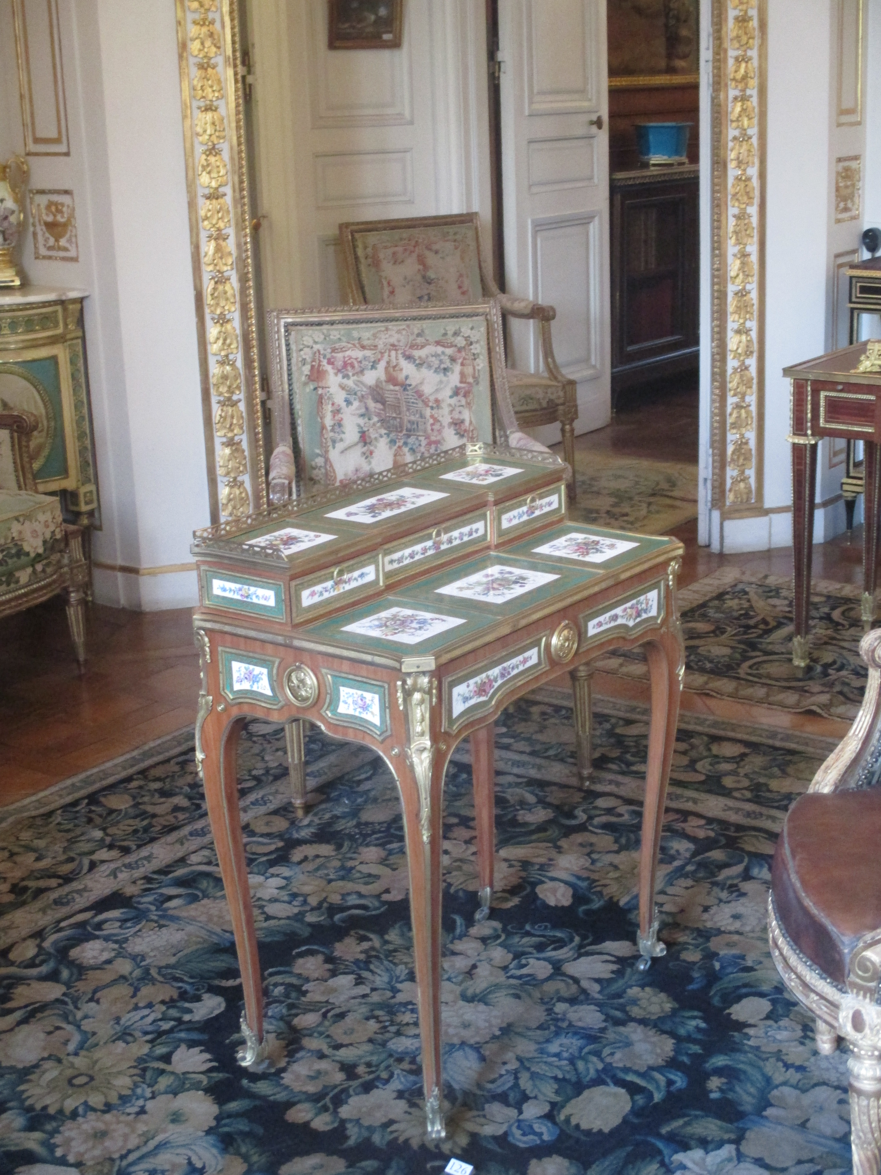 Musée Nissim de Camondo: bonheur-du-jour à gradin avec plaques en porcelaine de Sèvres, estampillé Martin Carlin (1766).